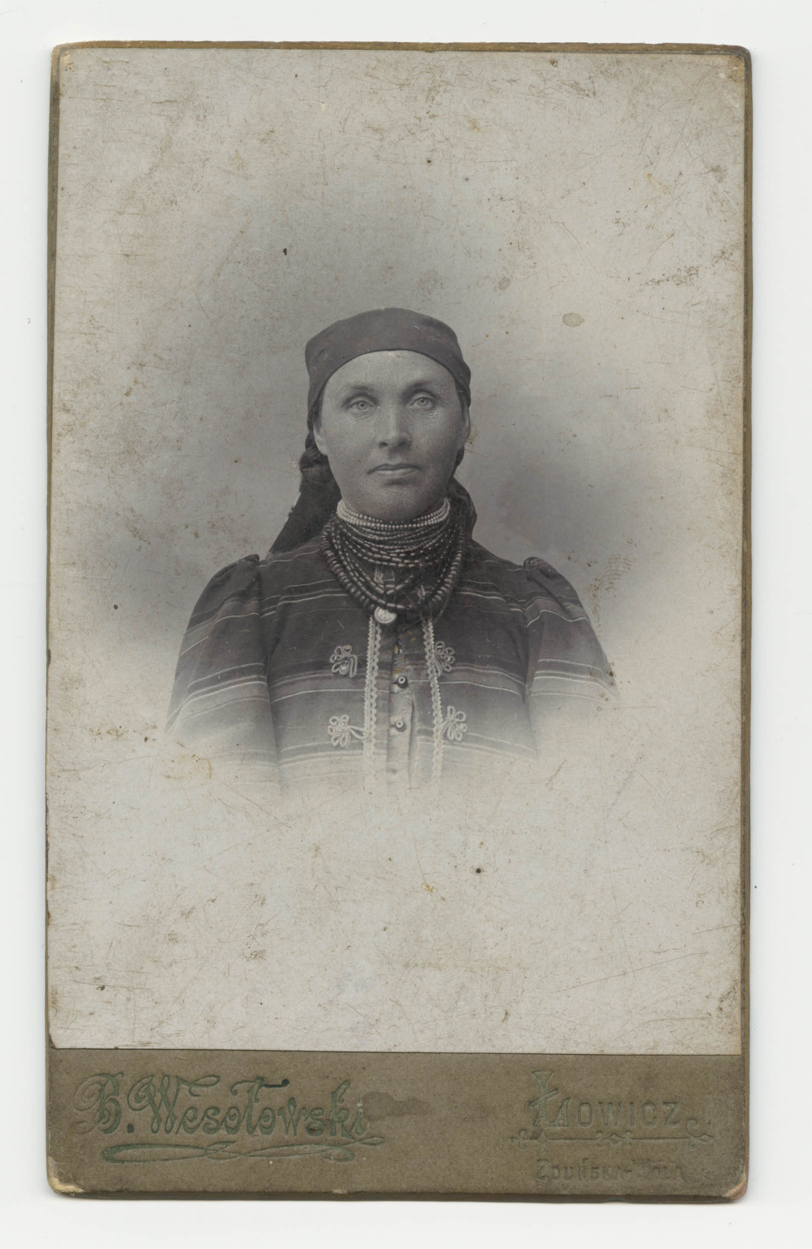 Fotografia wykonana w atelier zakładu fotograficznego "B. Wesołowski" w Łowiczu, przedstawia popiersie młodej kobiety w łowickim stroju ludowym. Włosy kobierty splecione w warkocz przykryte są ciemnąchustką, pod szyją ozdobne korale, kobieta ubrana jest wełniany gorset w paski, zapinany na metalowe lub kościane guziki. Na szczególną uwagę zasługuje bogata ilość sznurów korali na szyi kobiety. Zakład fotograficzny "B. Wesołowski" mieścił się na Starym Rynku w Łowiczu, miał też filię w Zduńskiej Woli przy ulicy Łaskiej. Na rewersie ozdobny druk reklamowy zakładu.